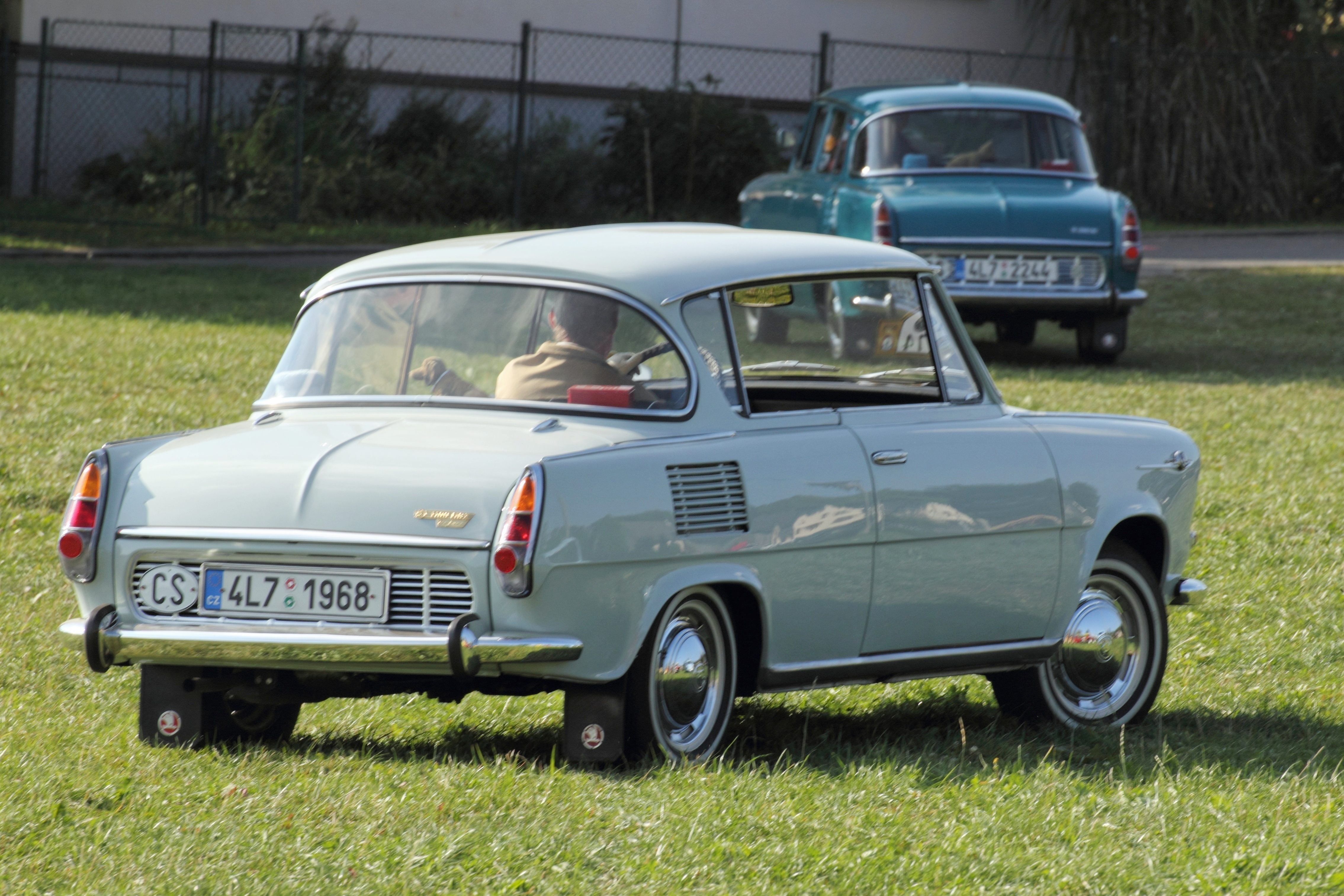 Škoda 1100 MBX, 110 let založení autoklubu v Liberci